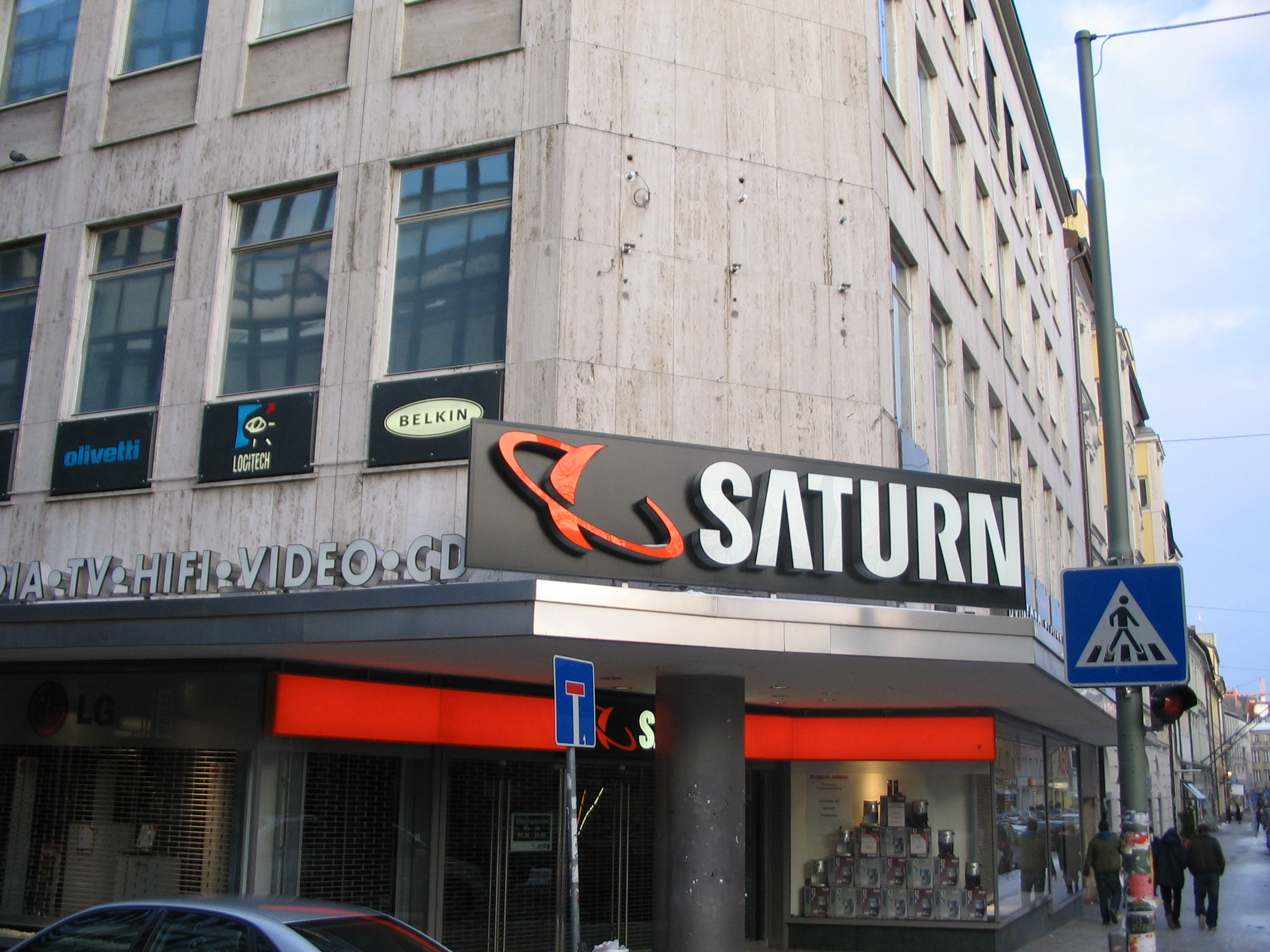 Logo of Saturn on a shop in Munich (Herzogspitalstraße / Herzog-Wilhelm-Straße)